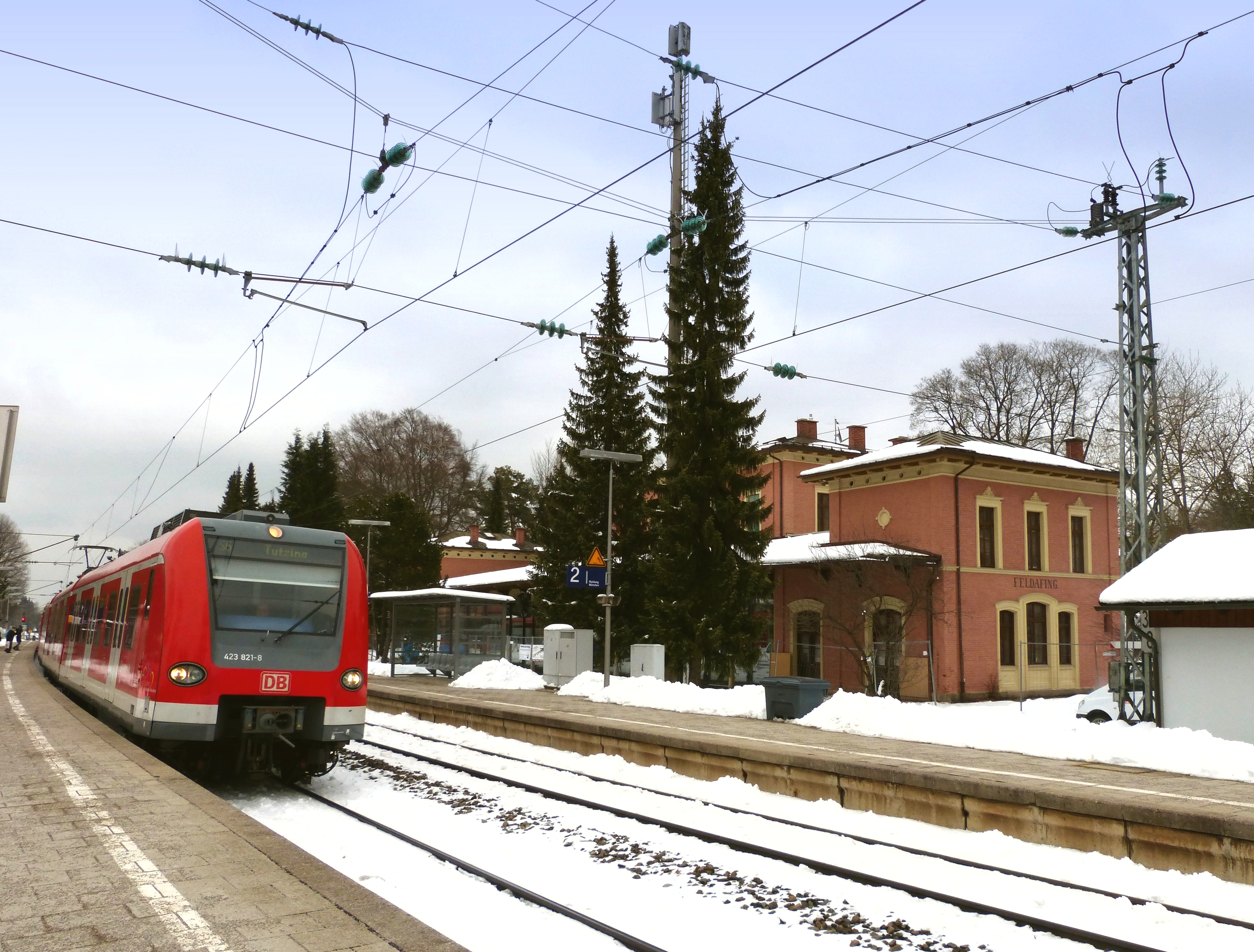 Feldafing, Bahnhofstraße 70, Bahnhof Feldafing, Gleisbereich.